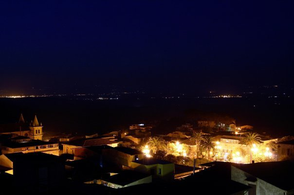 Seminara panorama